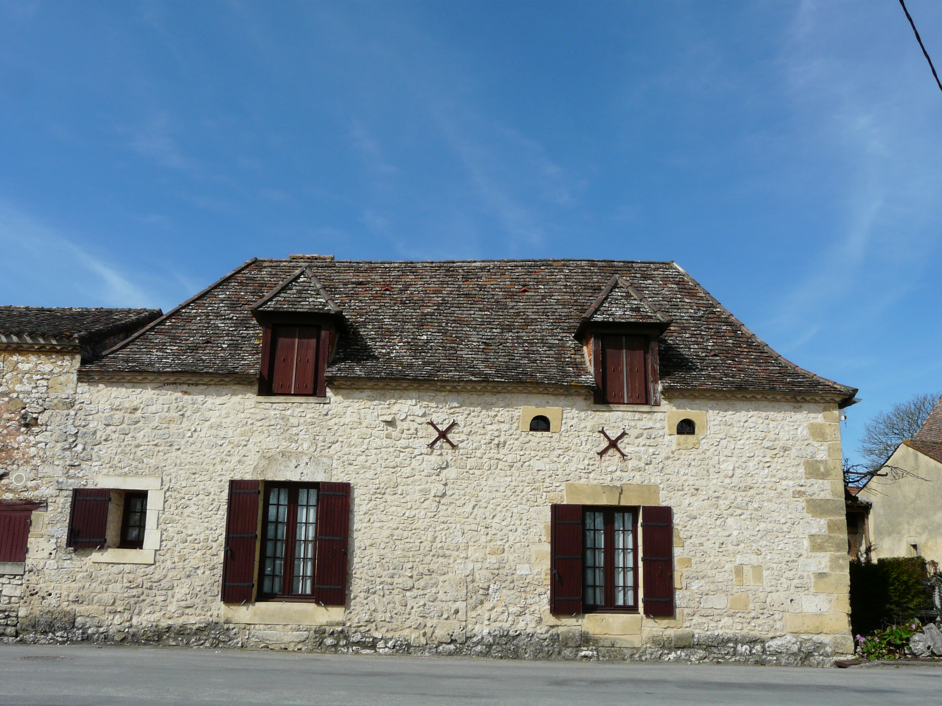 Maison dans le bourg de Faux, Dordogne, France.